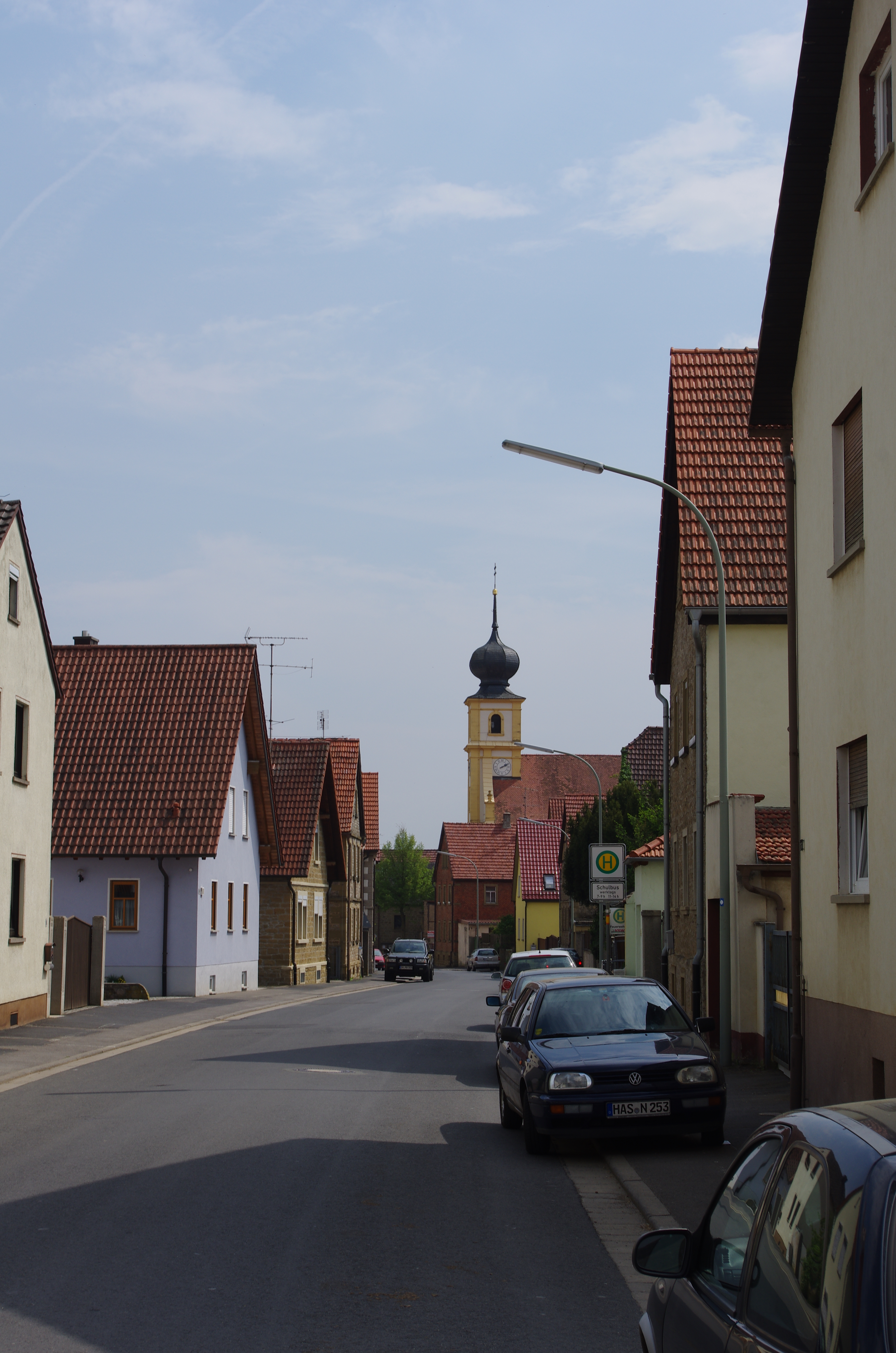 Schraudenbach, Gambachstraße, Blick Richtung Kirche, 2014